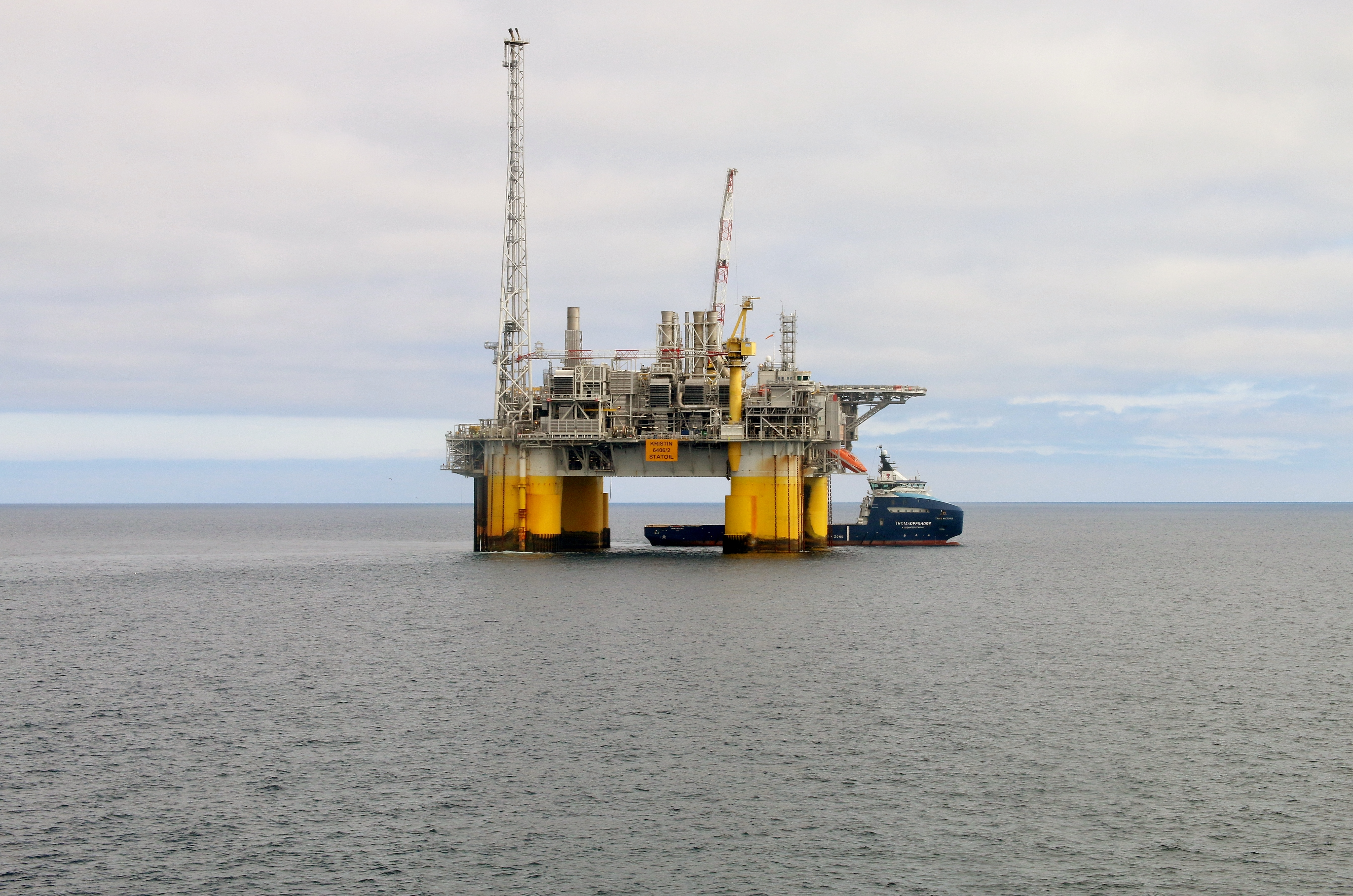 Kristin-feltet ligger i den sørvestlige delen av Haltenbanken. Kristin produserer rundt 10 millioner kubikkmeter rikgass hver dag. Foto: Øyvind Knoph Askeland, Norsk olje og gass